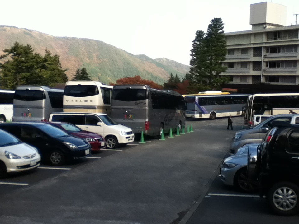 営業時の画像、歩道設置や大型車普通車の区分のない時代のもの